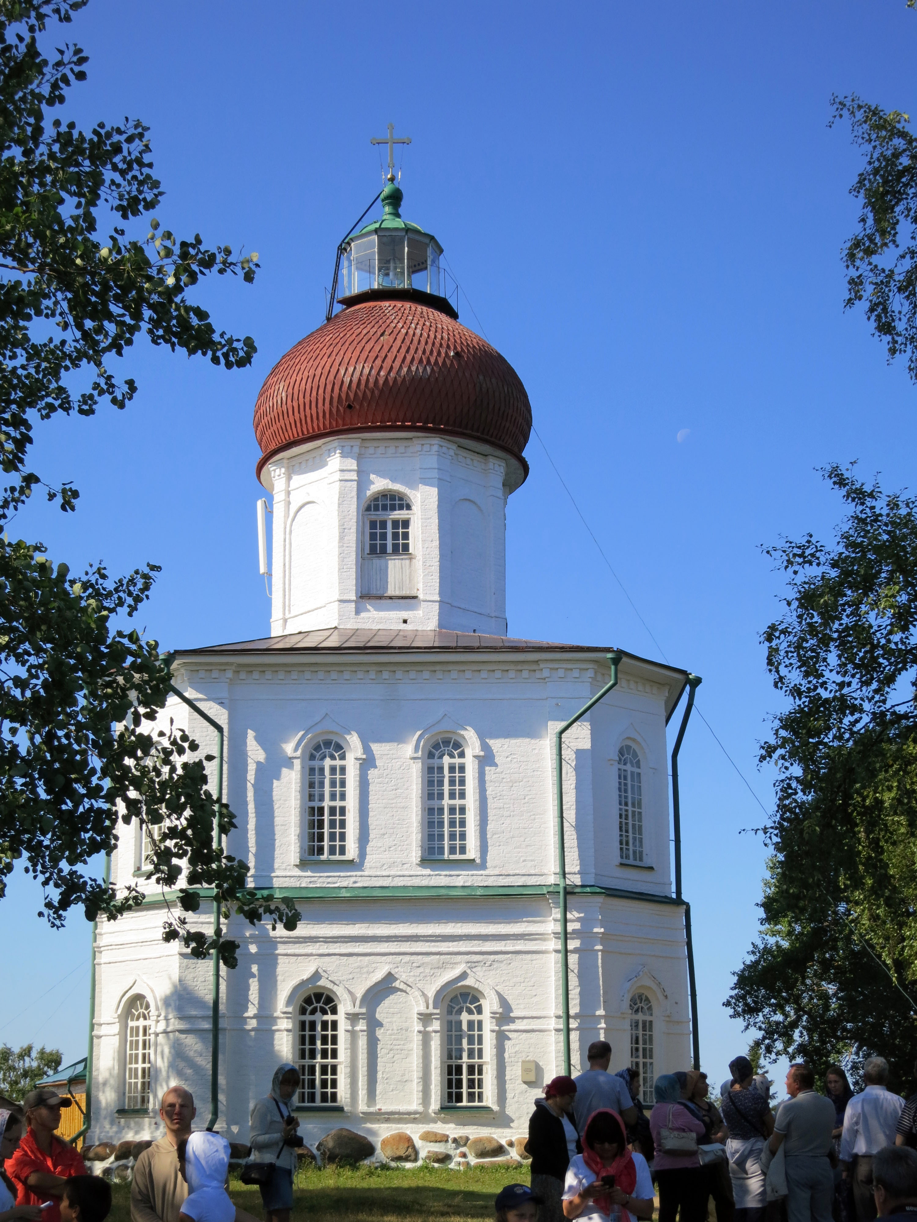 Вознесенская церковь-маяк на Секирной горе. Соловки.